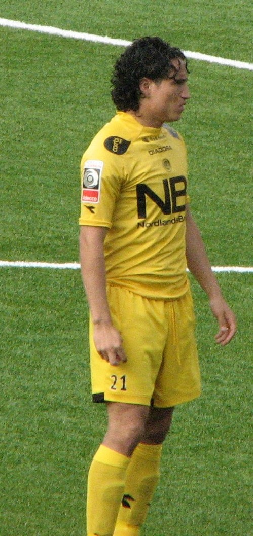 Randall Brenes under oppstillingen til BOdø/Glimt-Sogndal